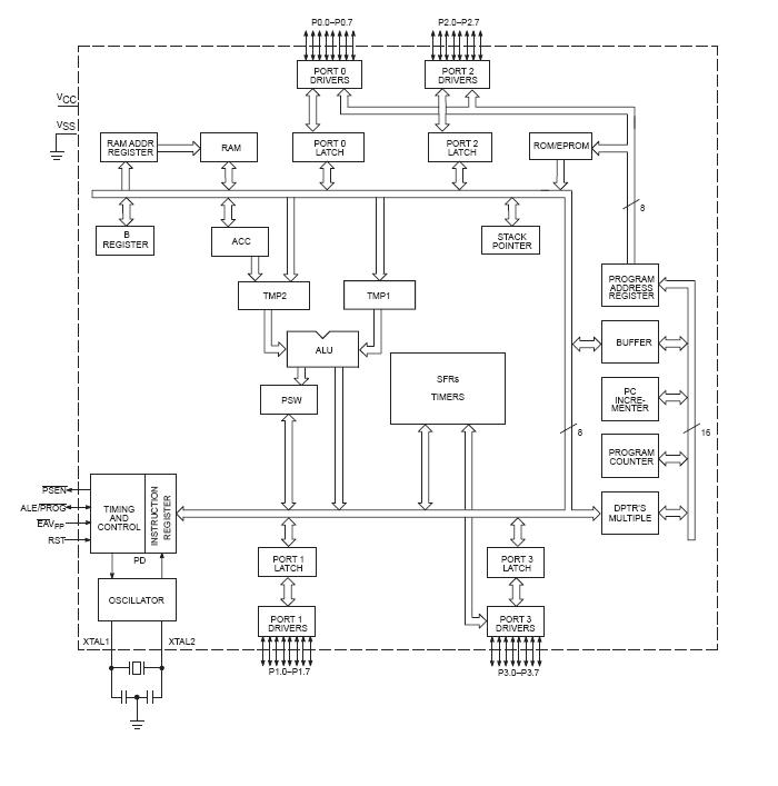 Diagrama de bloques de un uC MCS51